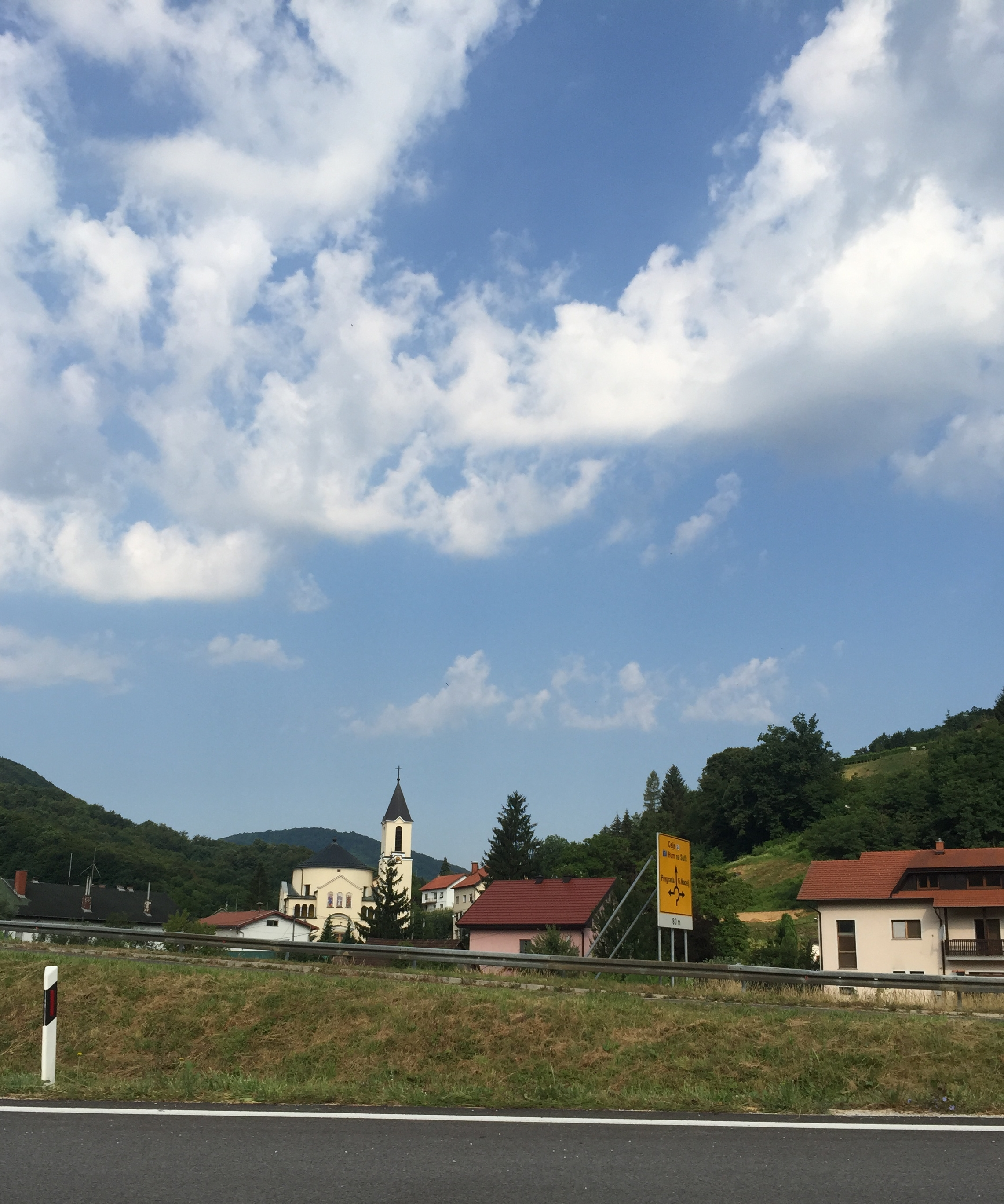 Đurmanec, Croatia